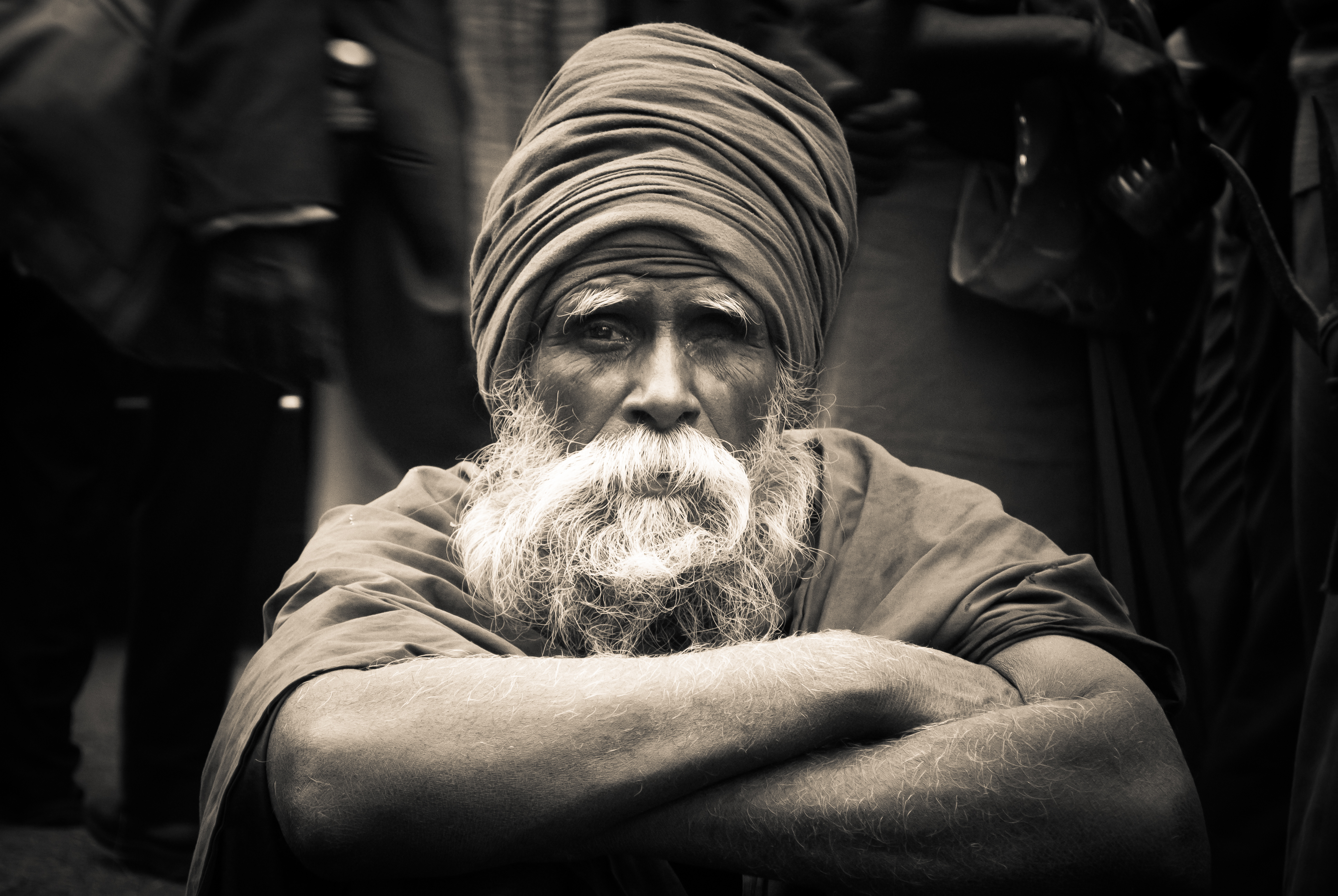 এই সাধুকে আমি দেখেছিলাম কলকাতায় বাবুঘাটে গঙ্গাসাগর ট্রানসিট ক্যাম্পে অপেক্ষারত অবস্থায় । একটিমাত্র চোখের এক অদ্ভুত দৃষ্টি আমায় ভীষণভাবে আকর্ষণ করেছিল ।